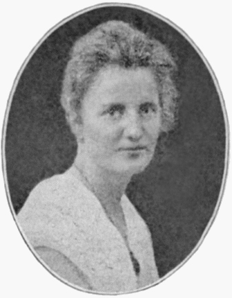 Porträt von Käthe Evers (1893–1918)